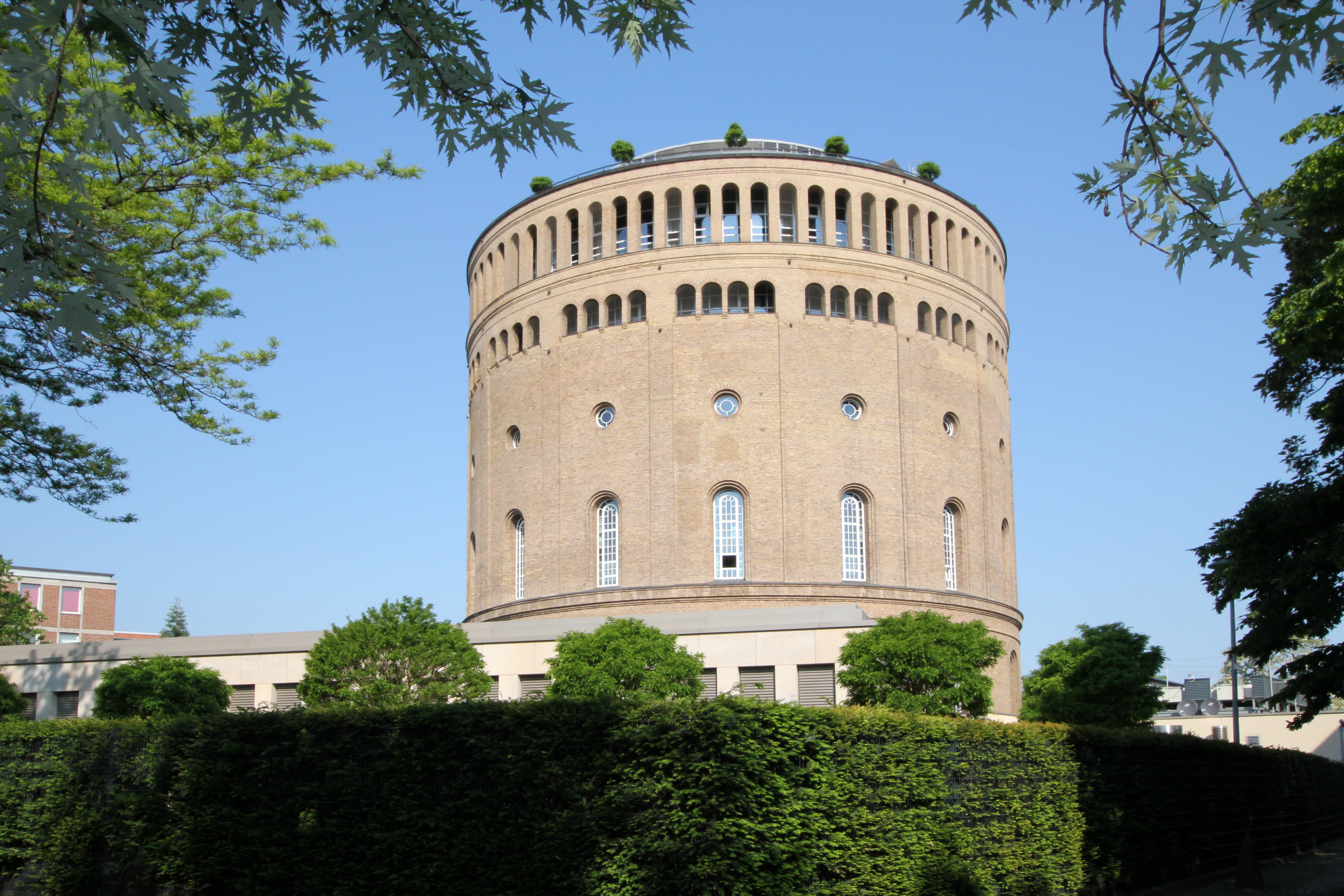 Köln, Hotel im Wasserturm, Kaygasse 2This is a photograph of an architectural monument.